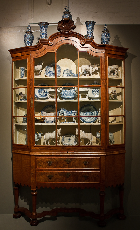 Vitrinekast met Delfts aardewerk Princessehof - Vitrinekast met Delfts aardewerk